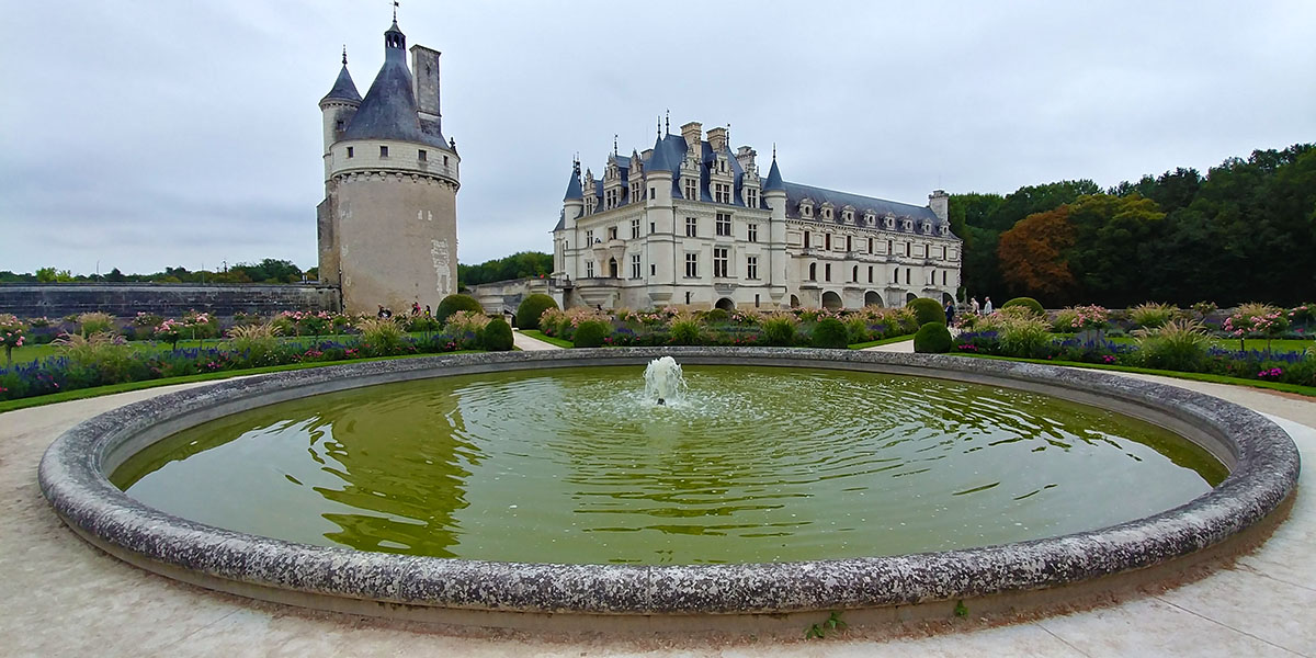 Vista del castillo de Chenonceau desde el Jardín de Catalina de Médicis